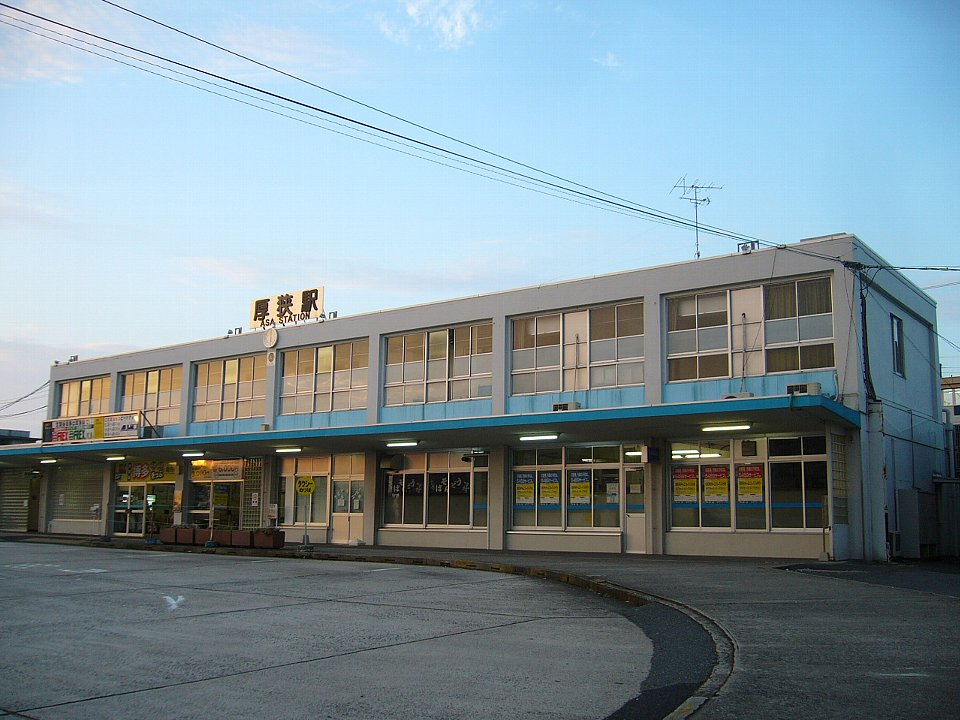 朝のja:厚狭駅駅舎 ja:2006年ja:8月23日 Bakkai撮影